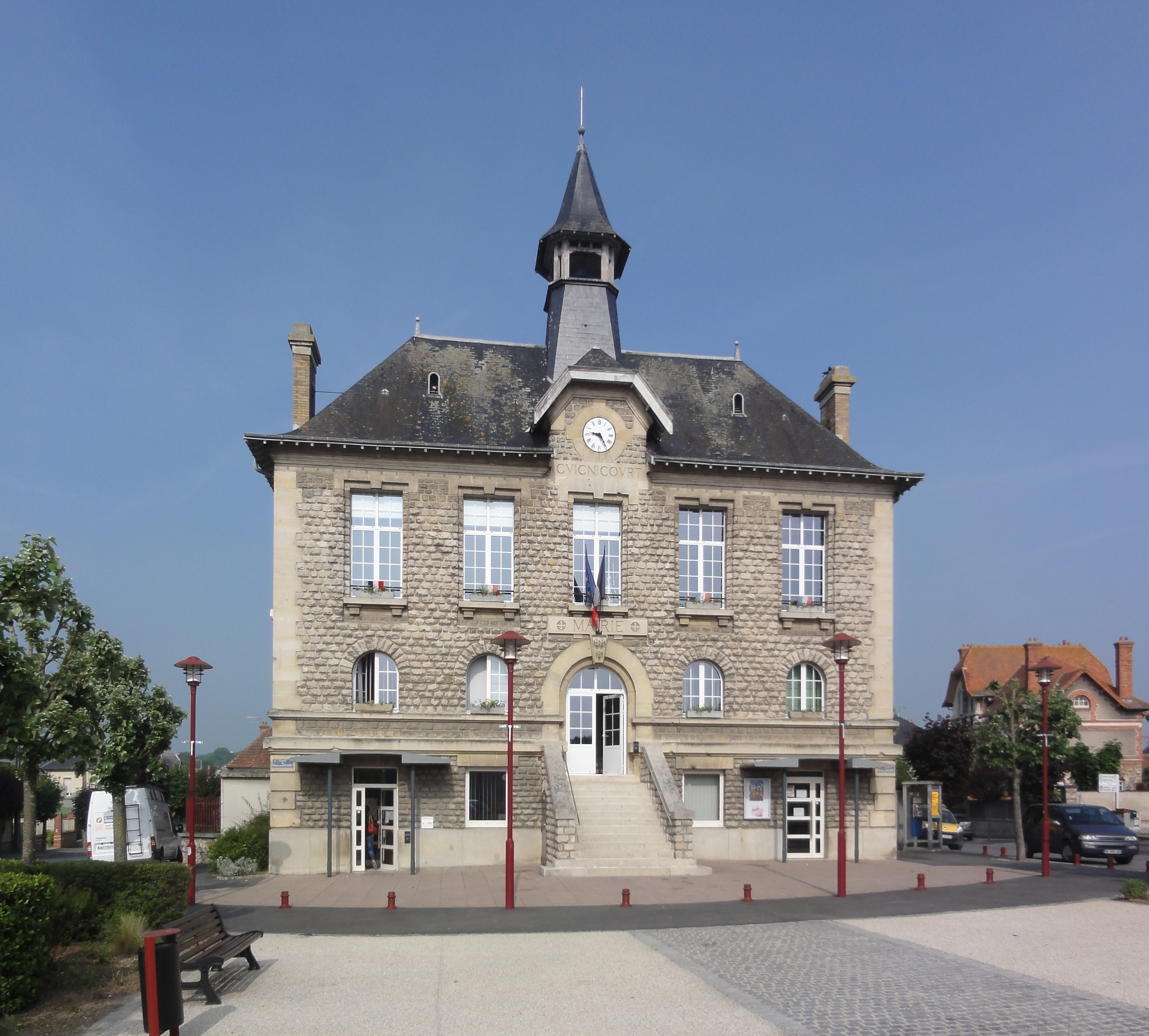 Guignicourt (Aisne) Mairie